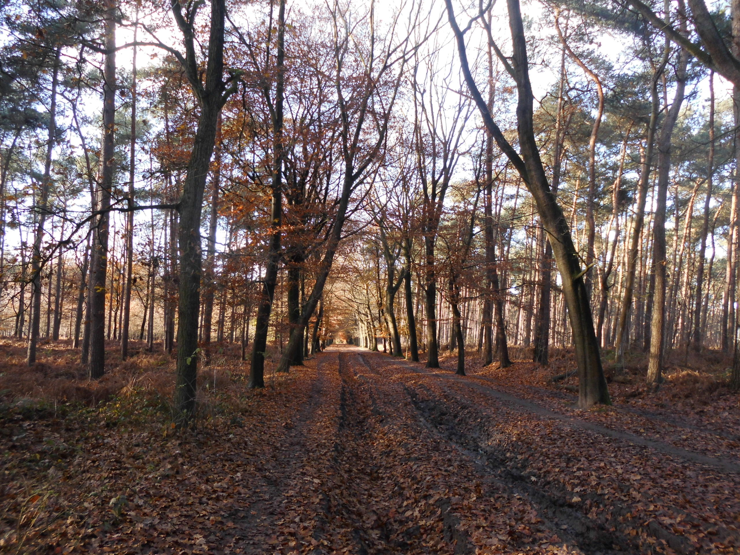 Antwerpse Heirweg in Lembeke - Kaprijke - Oost-Vlaanderen - België